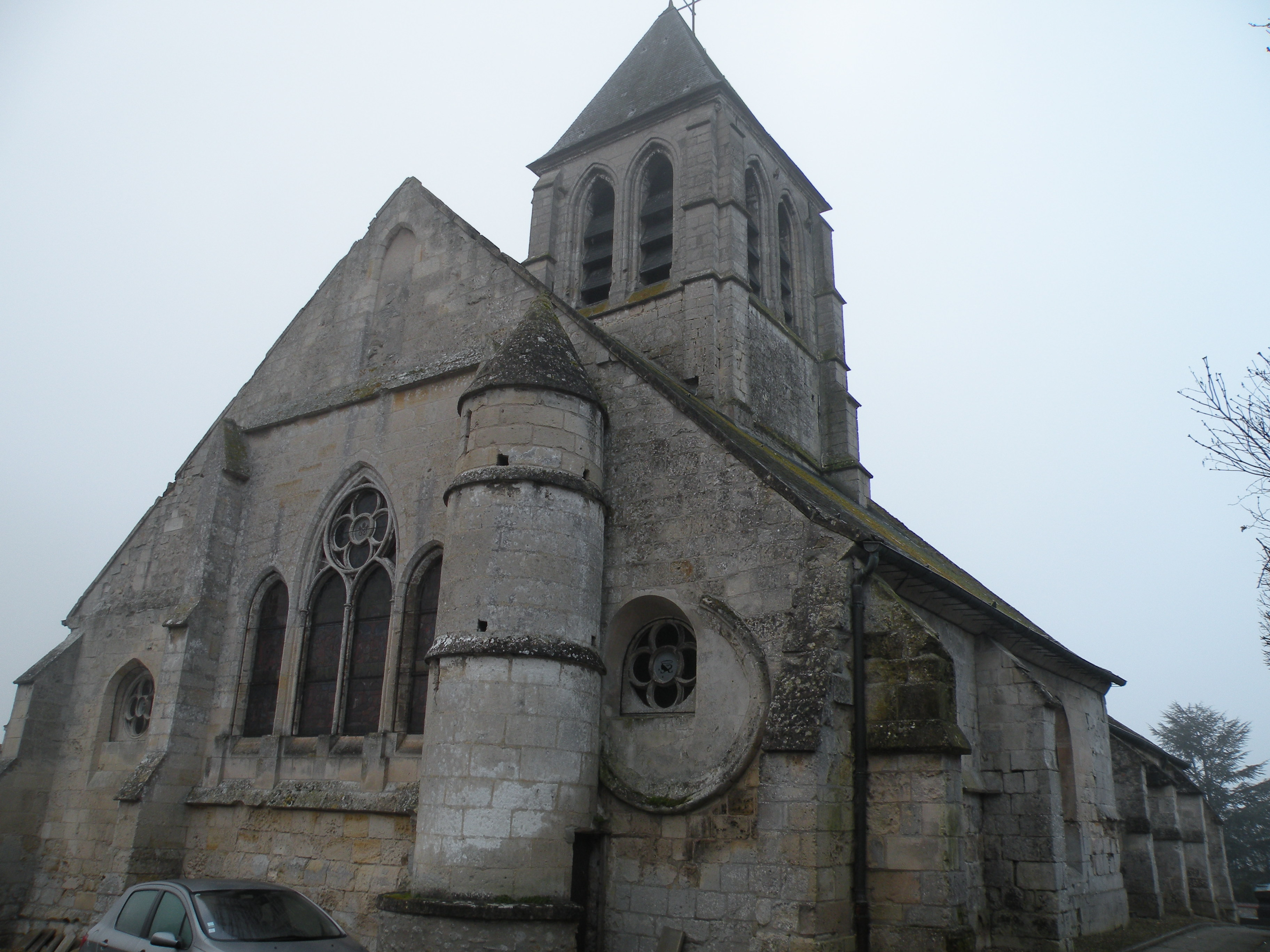 Église Saint-Pierre-Saint-Paul d'Arronville